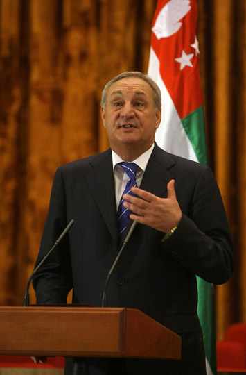 Президент Абхазии Сергей Багапш во время пресс-конференции по итогам российско-абхазских переговоров в Сухуми